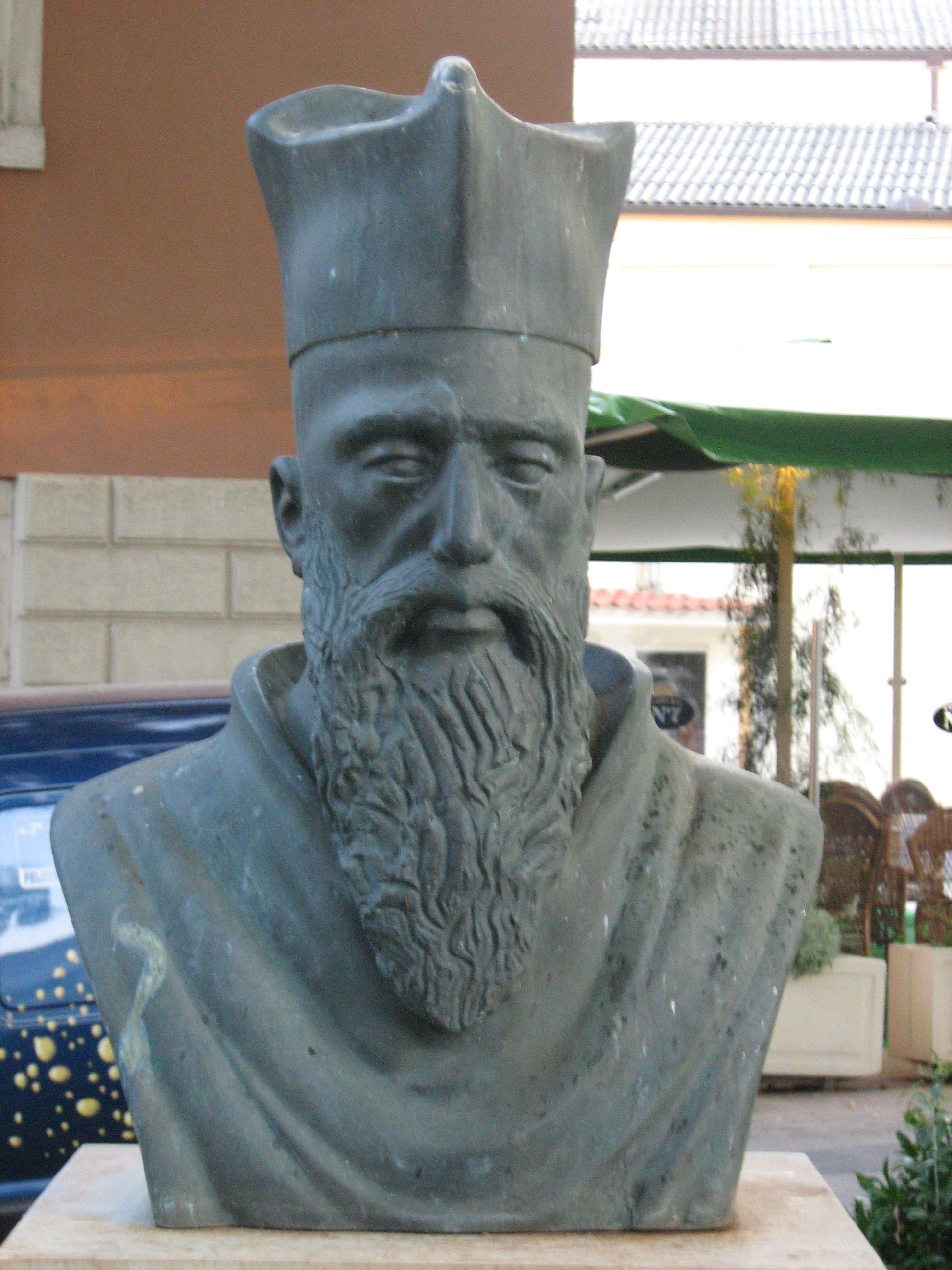 Šime Budinić